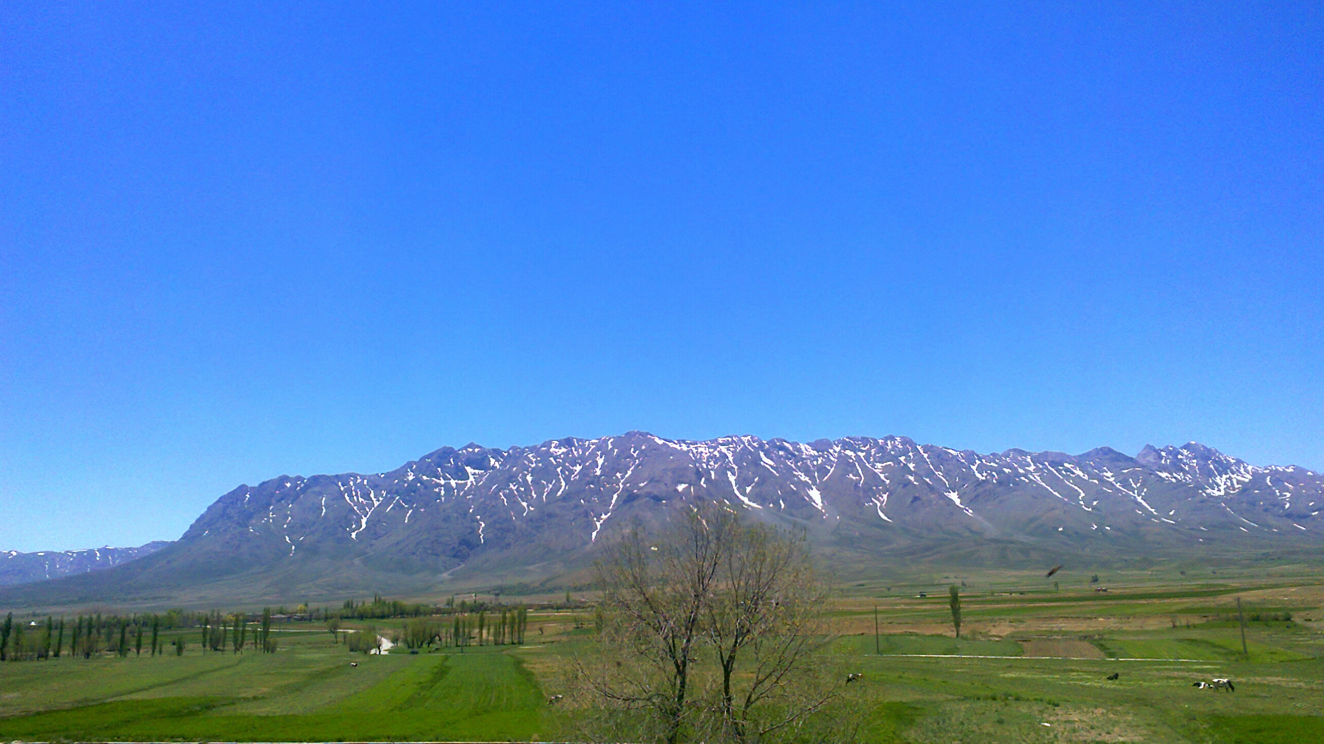 نمایی از اطراف روستای داشکسن